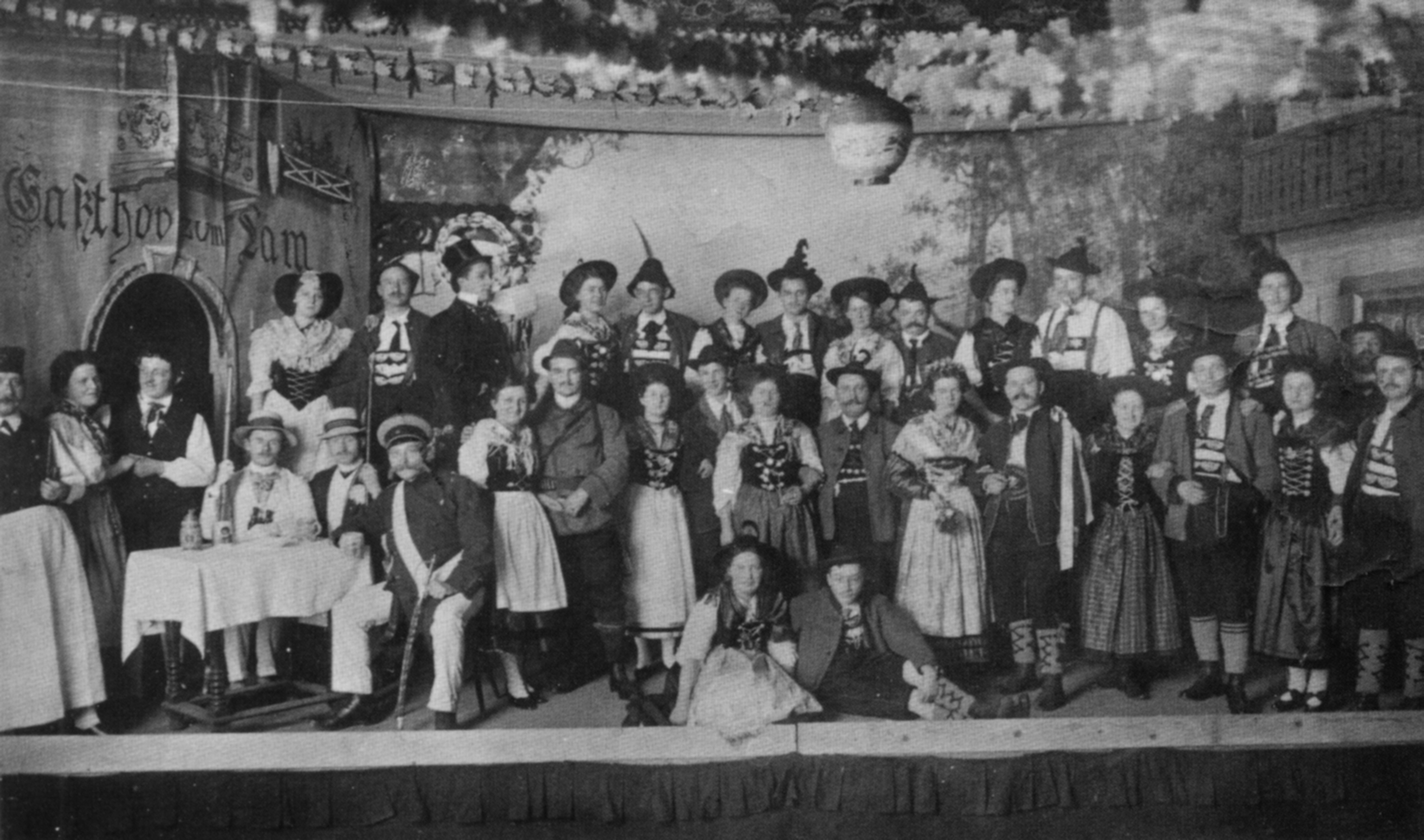 Lörrach, Gesangsverein Frohsinn bei einer Fastnachtsaufführung 1910